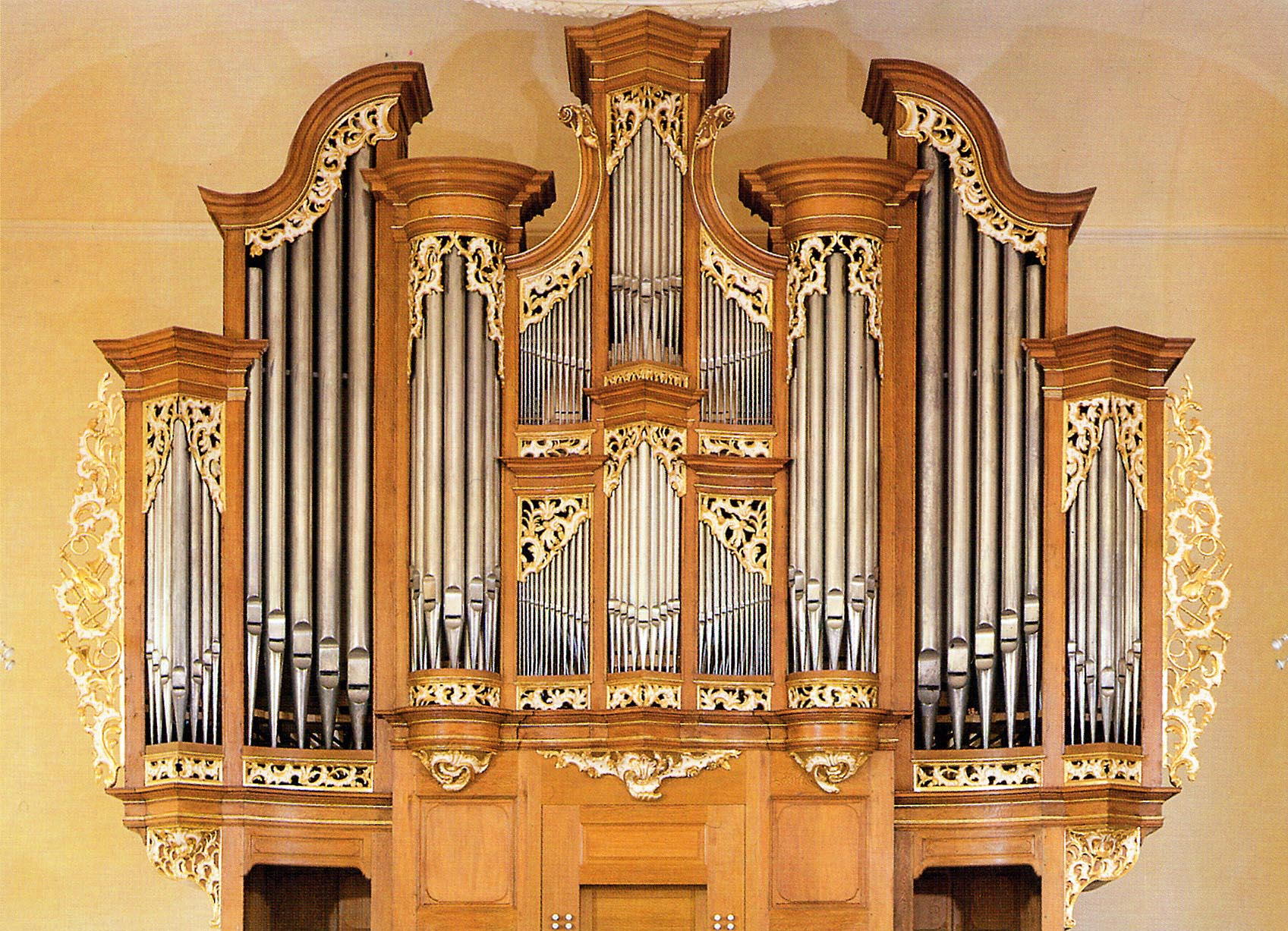 Orgel der Durlacher Stadtkirche, Karlsruhe, Baden